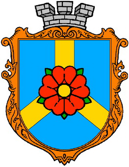 Герб смт Красне